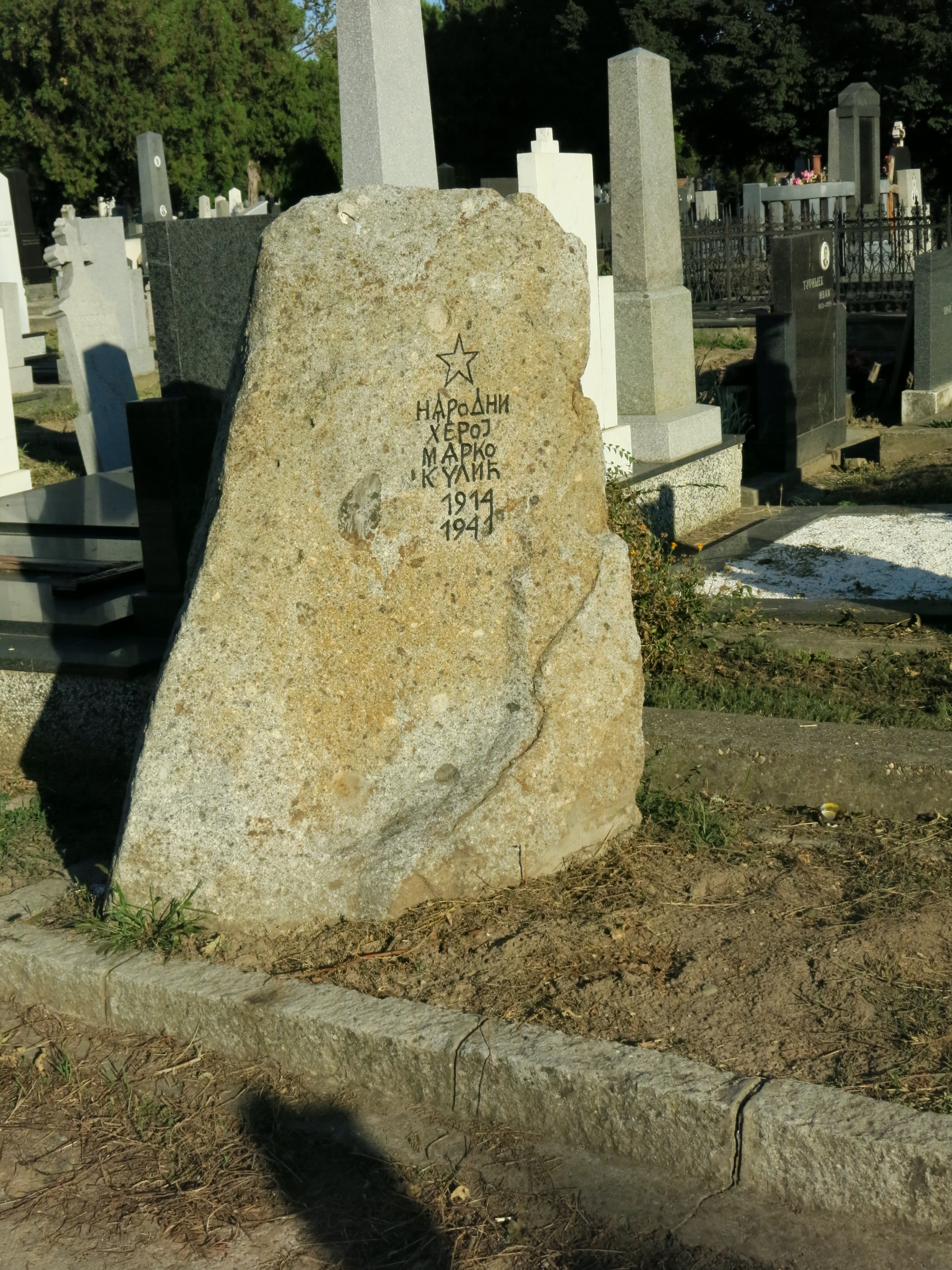 Надгробни споменик Марка Кулића